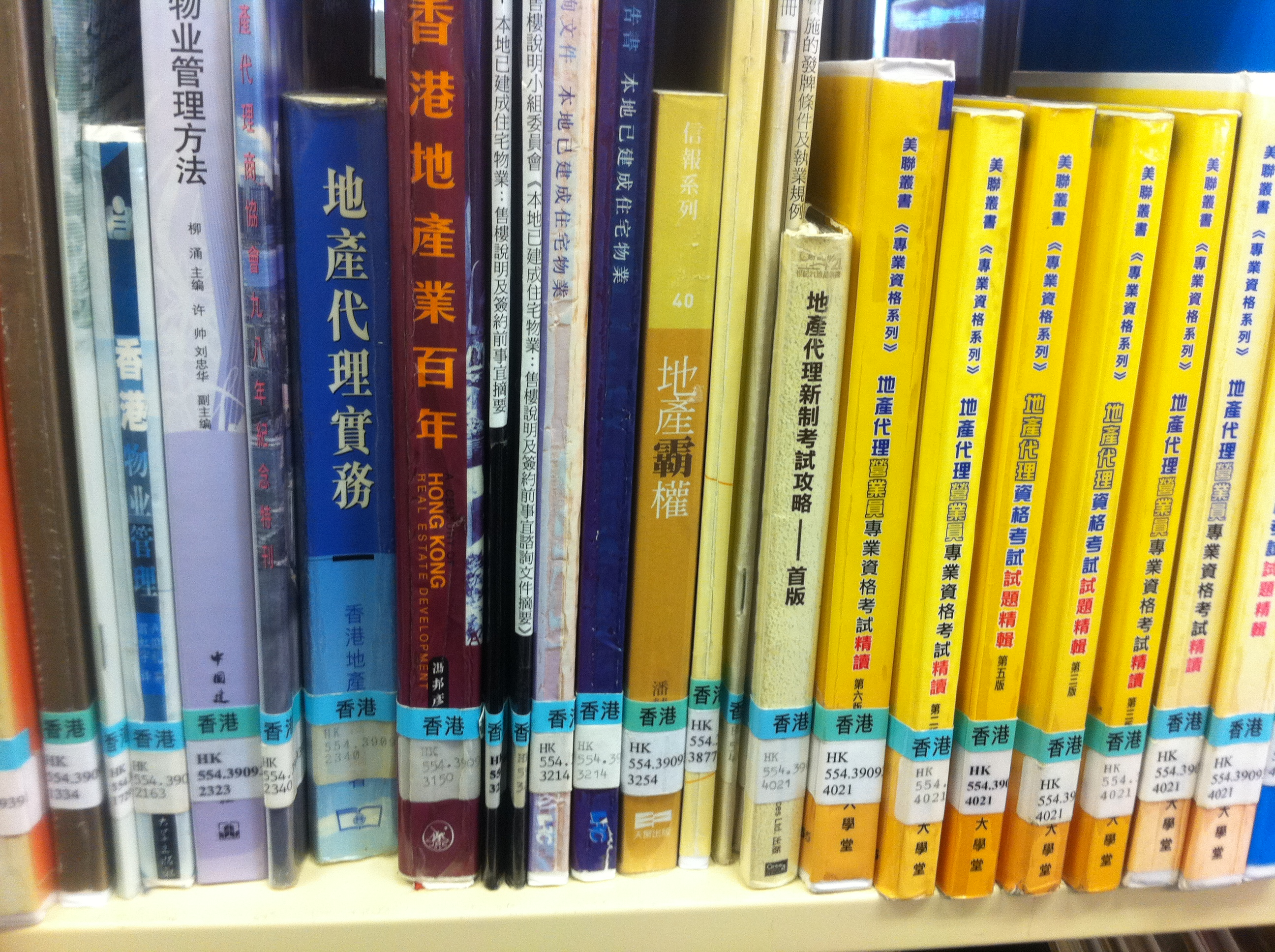 中文（香港）: 香港中央圖書館|參考書地產霸權